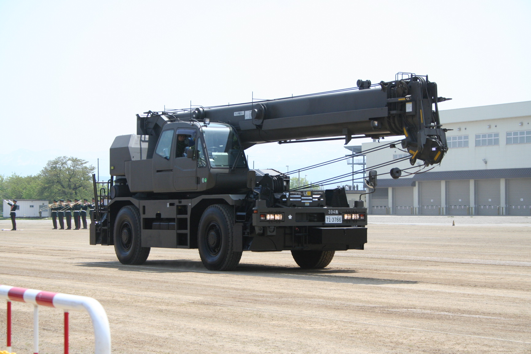 高田駐屯地にて撮影